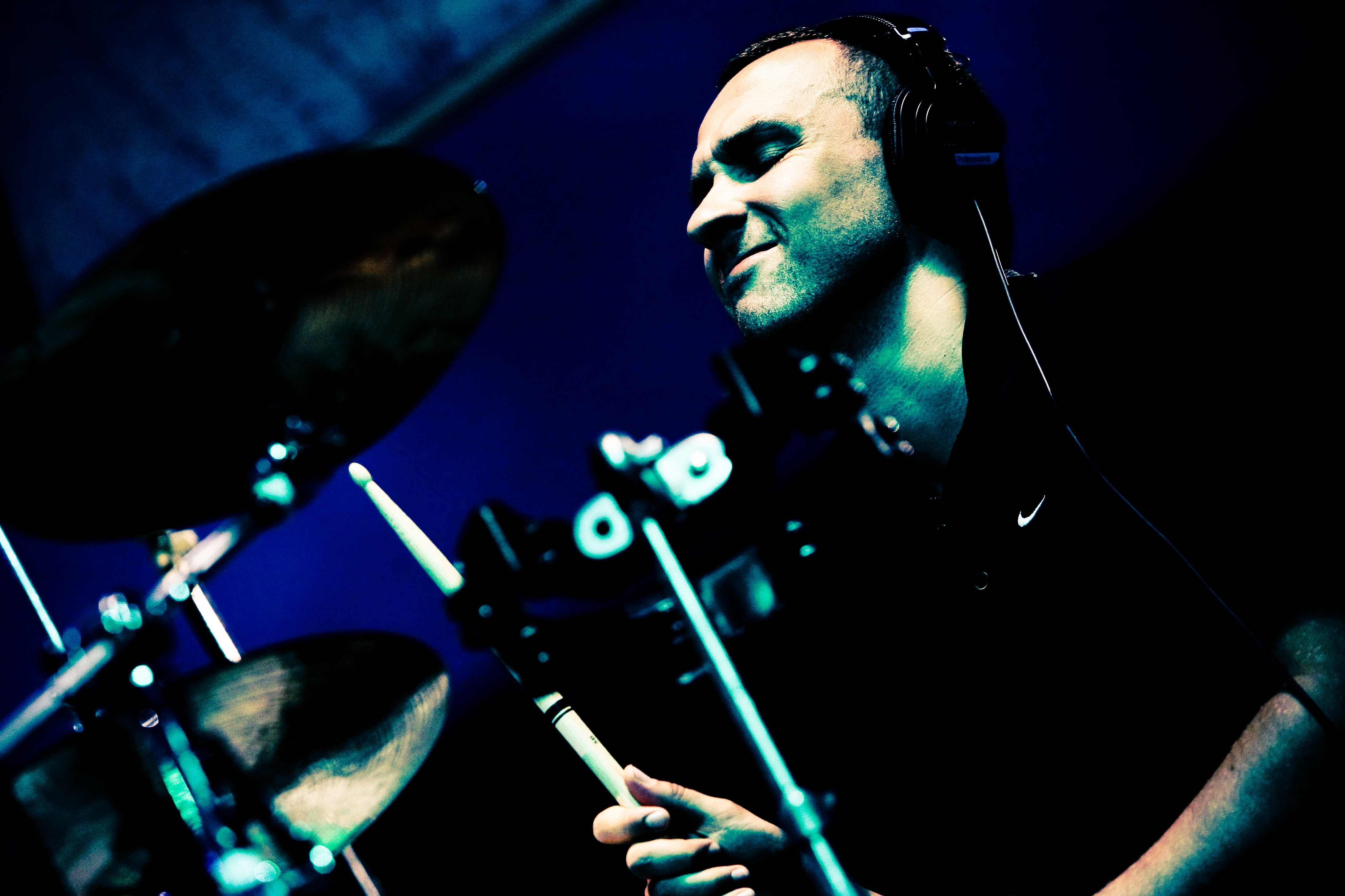 Prāta Vētras bundzinieks Kaspars Roga